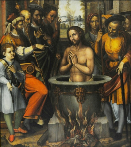 Martirio de San Juan Evangelista, óleo sobre tabla, Palacio Episcopal de Cuenca